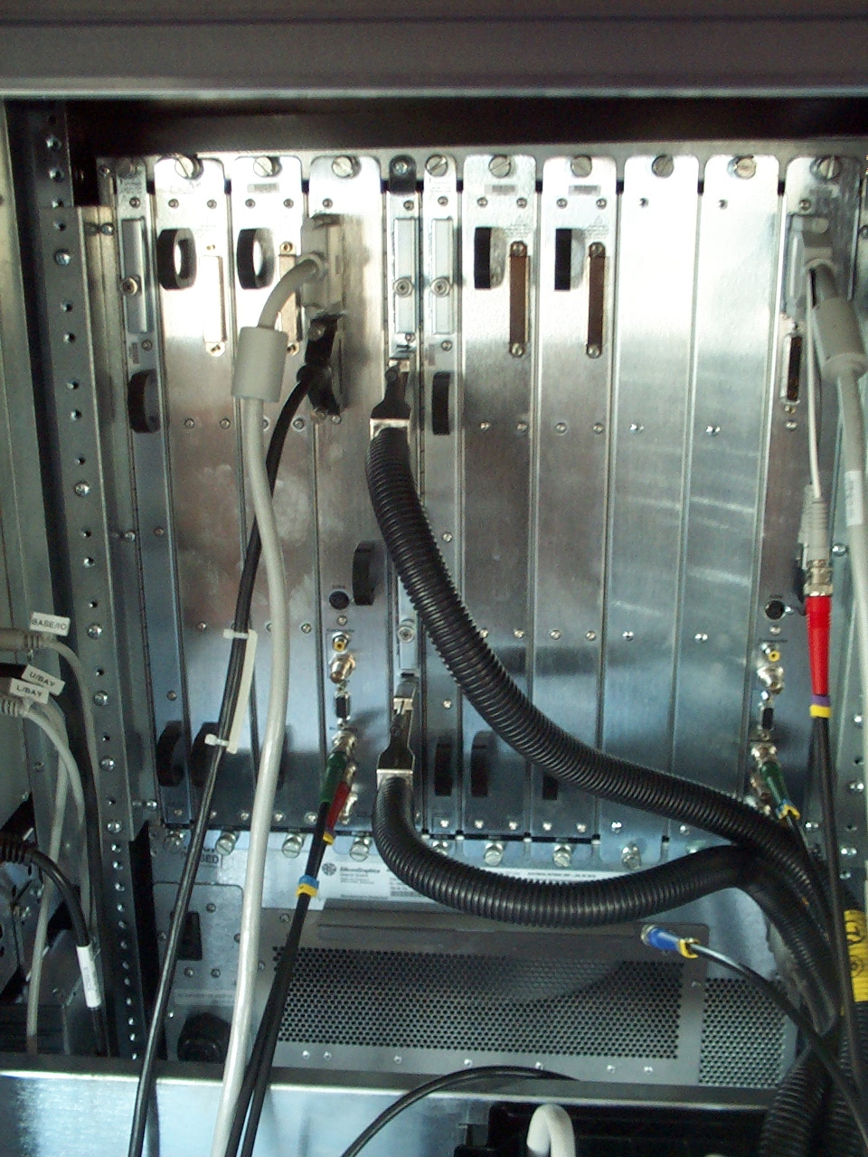 IR3 Onyx2, auteur JC Penalva